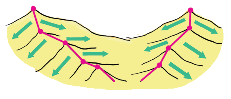 분수계의 이해